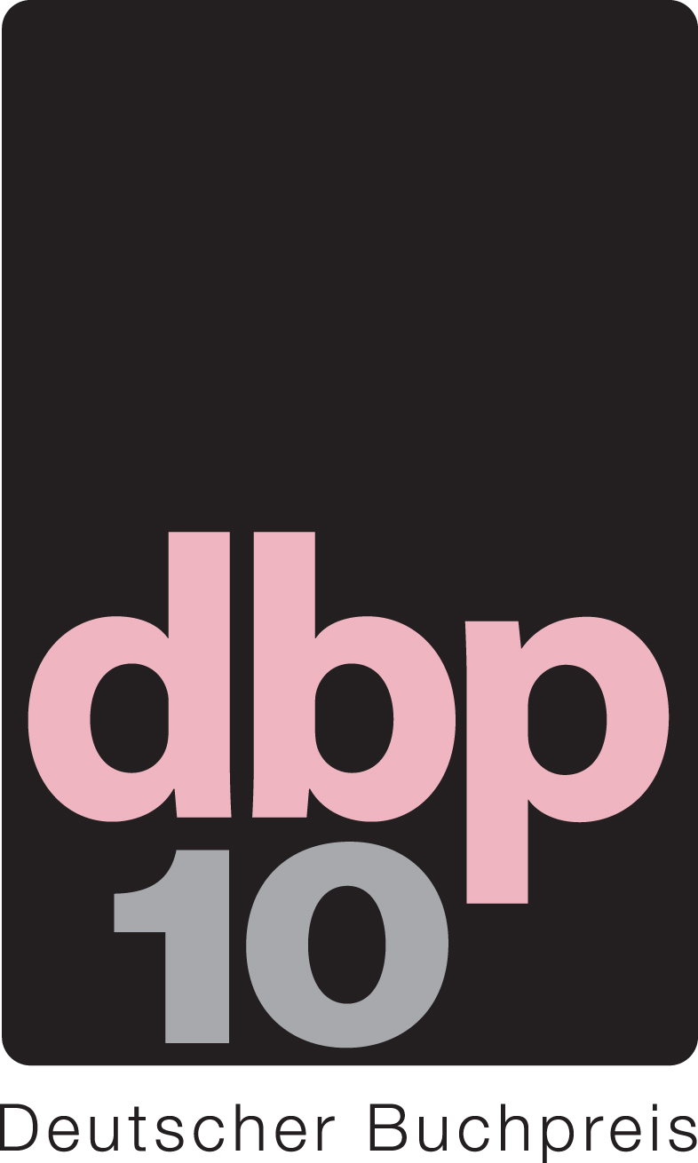 Logo Deutscher Buchpreis 2010